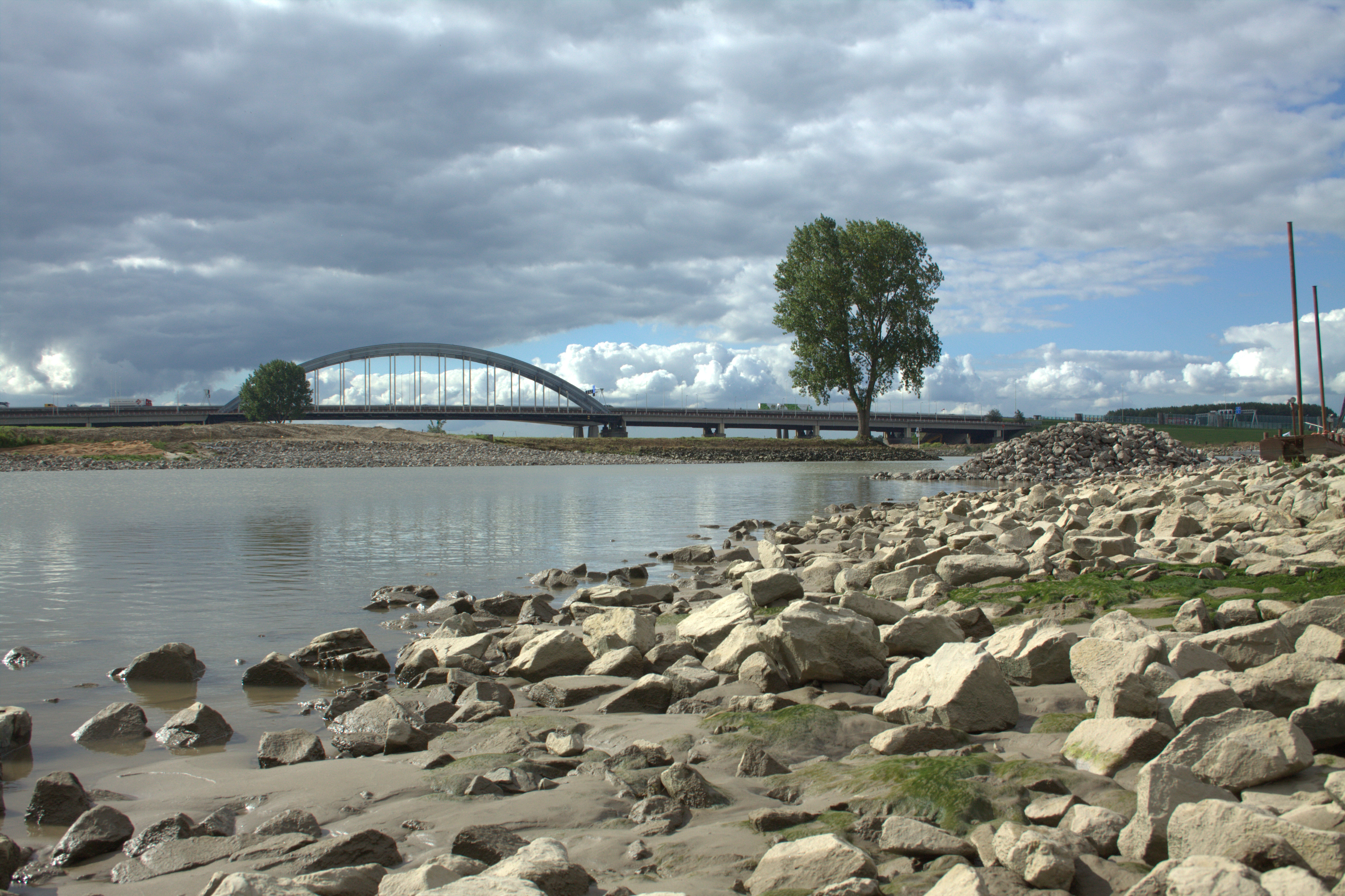 Een in 2015 gegraven neven geul van rivier de Lek bij Vianen in het kader voor ruimte voor de rivier de Lek.